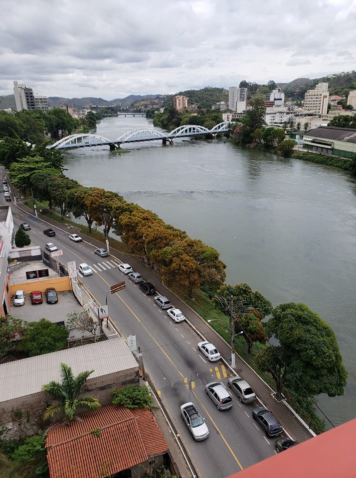 Rio Paraíba do Sul no Centro